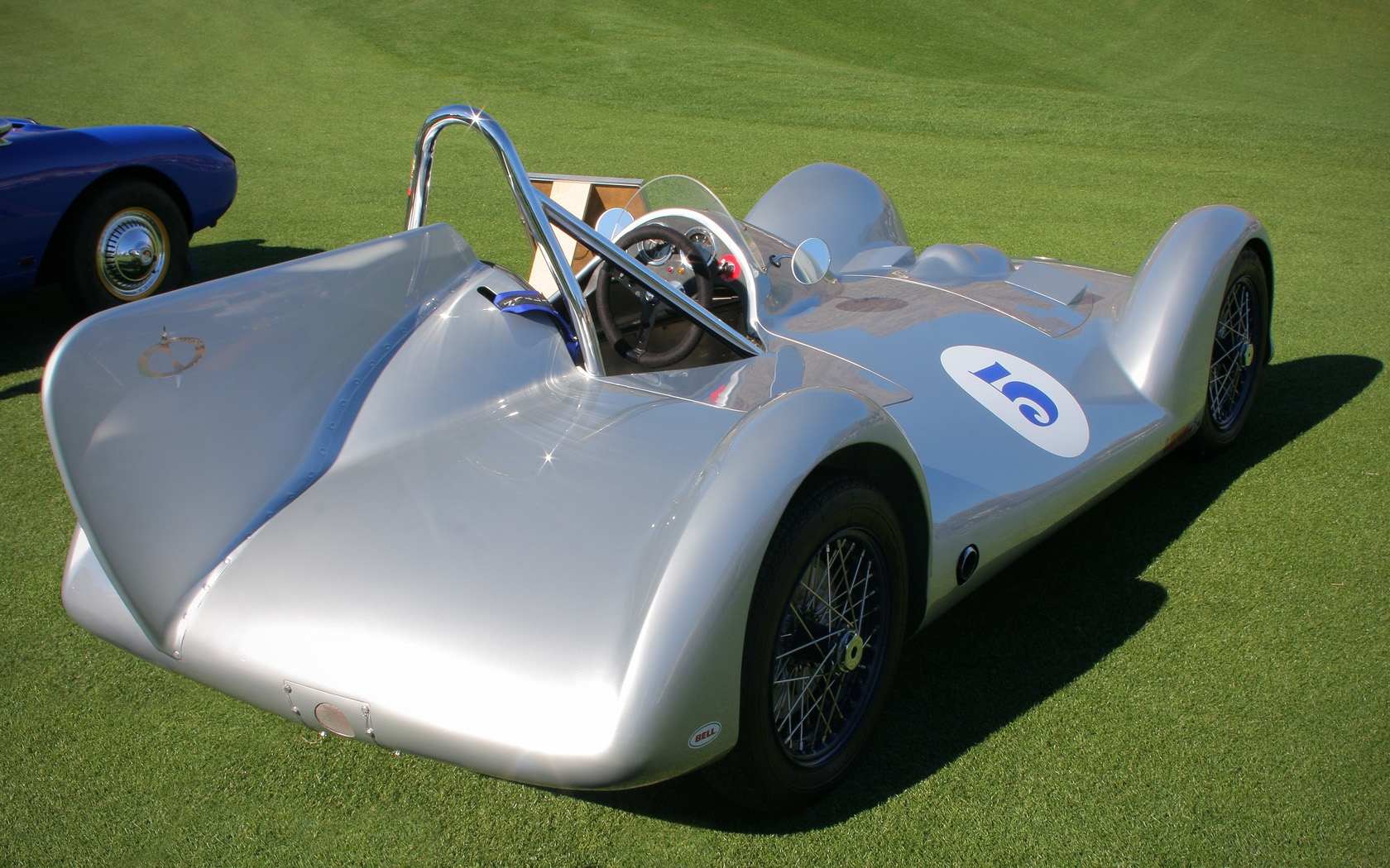 2011 Desert Classic, La Quinta, CA